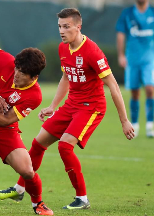 16.01.2017. Объединенные Арабские Эмираты, Дубай. «Газпром»-тренировочные сборы в Дубае: 16 января, контрольный мат «Зенит» — «Чанчунь Ятай».